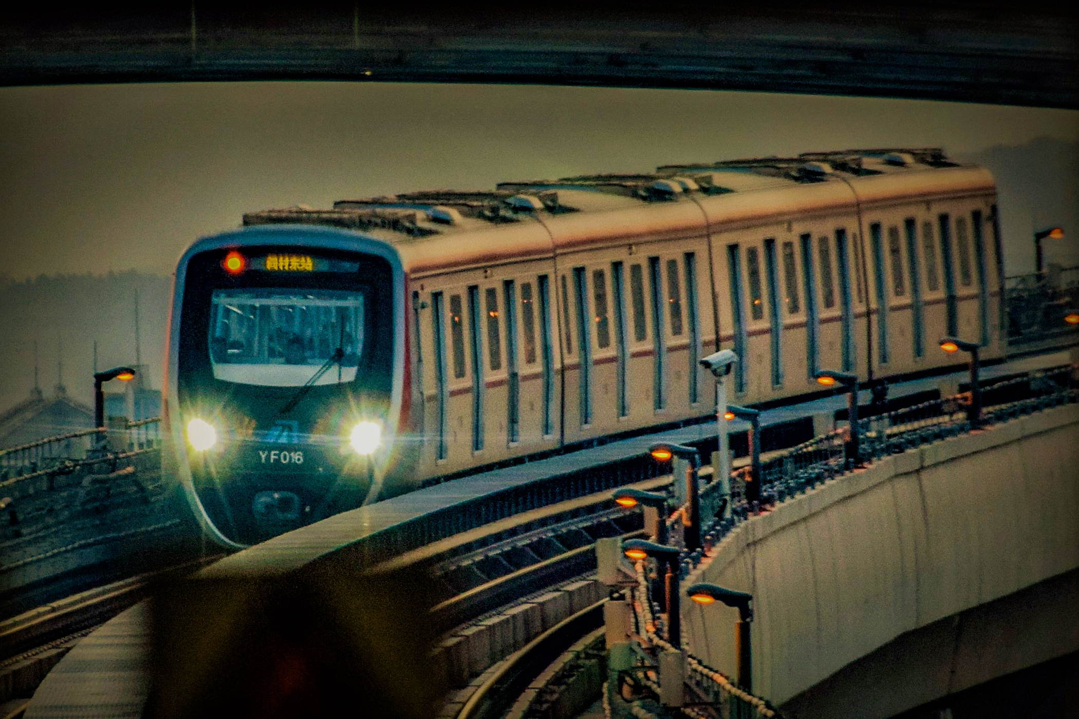 中文（中国大陆）: YF016即将到达饶乐府站